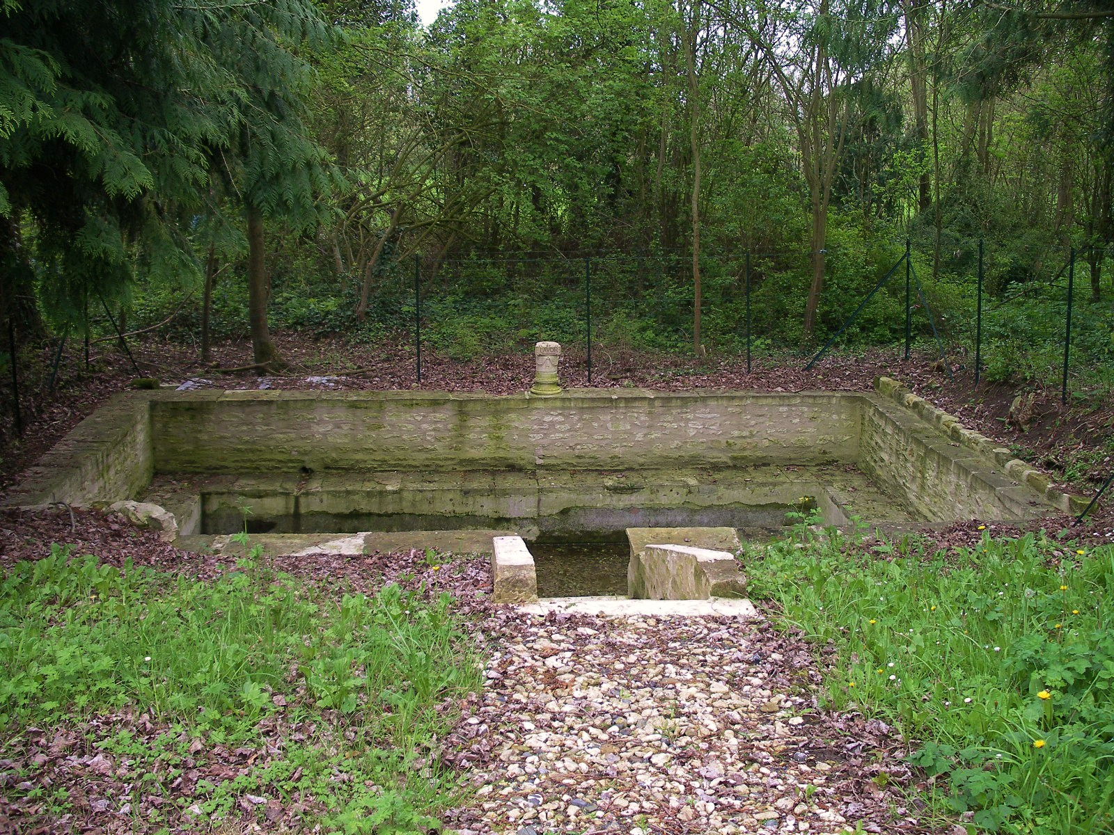 Lavoir de Loucelles (Calvados)